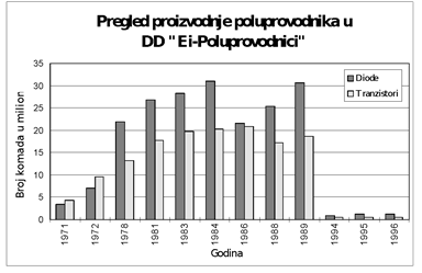 Grafik obima proizvodnje po godinama u fabrici poluprovodnika u Ei Niš.